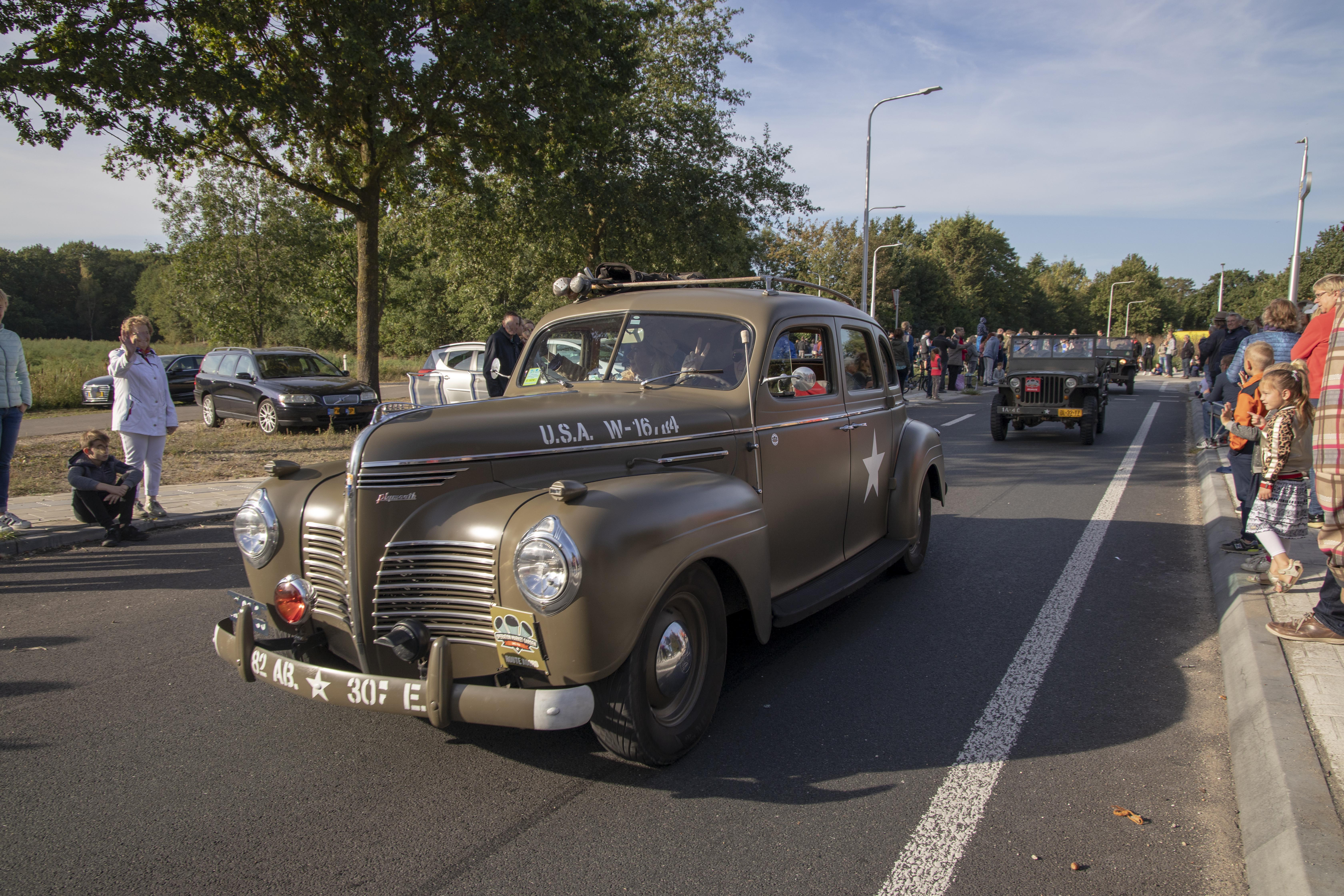 Plymouth P10 tijdens Market Garden 2019